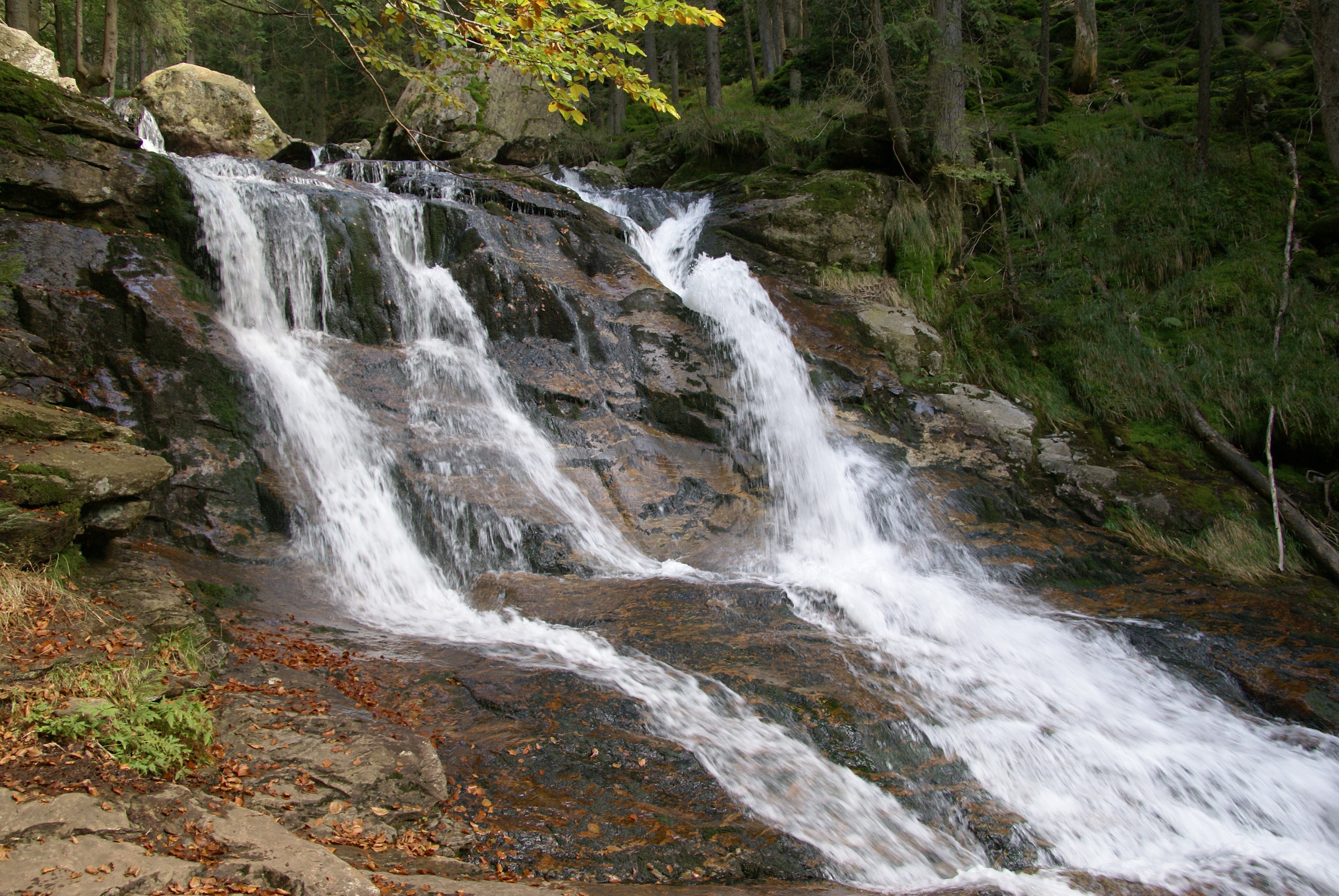 Rißlochfälle bei Bodenmais im Bayerischen Wald